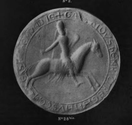 Seal of Geoffrey II of Brittany